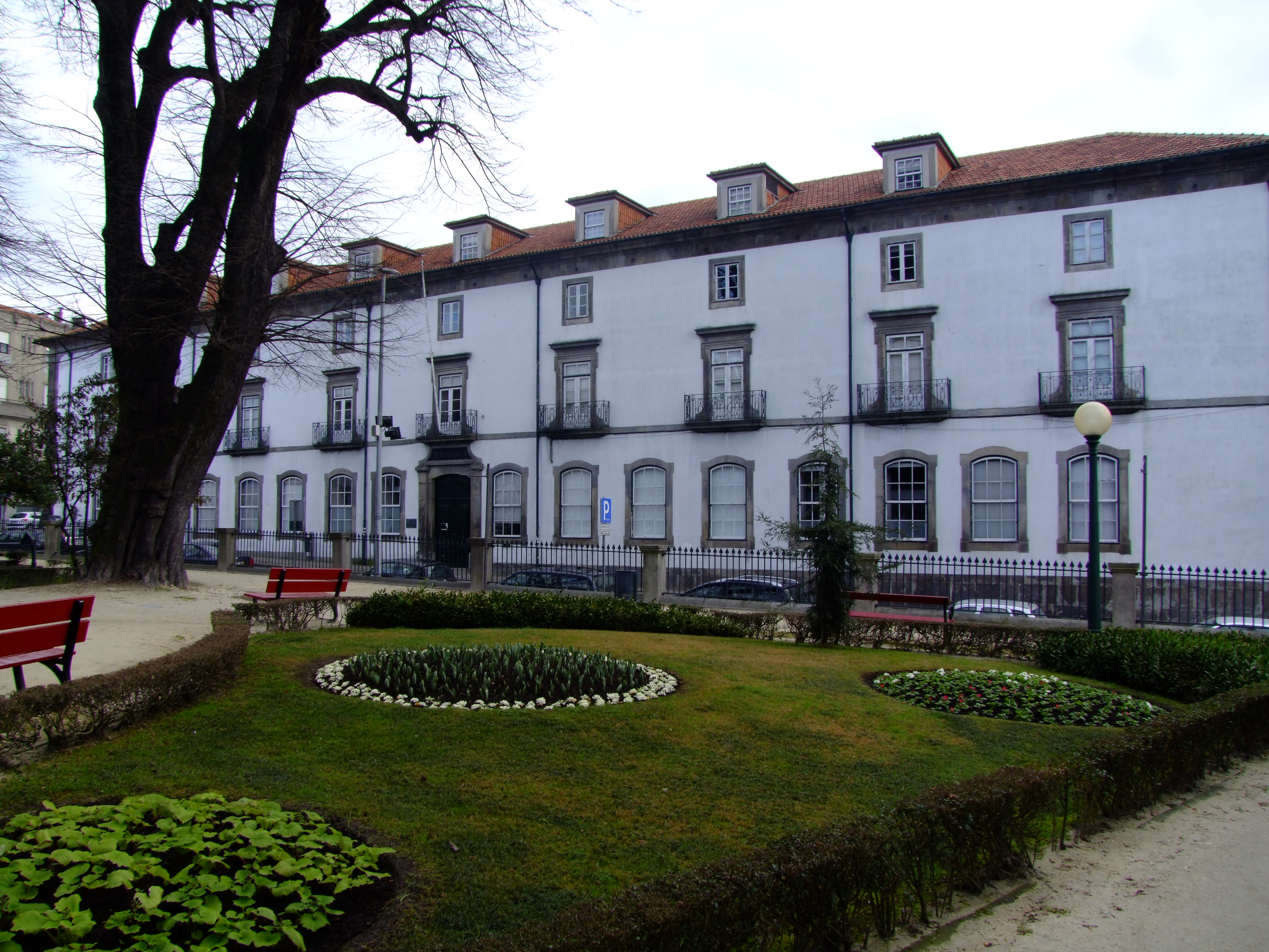 Biblioteca Municipal do Porto, Portugal.